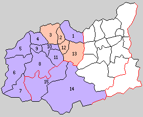 徳島県三好郡の町村制時点の町村。